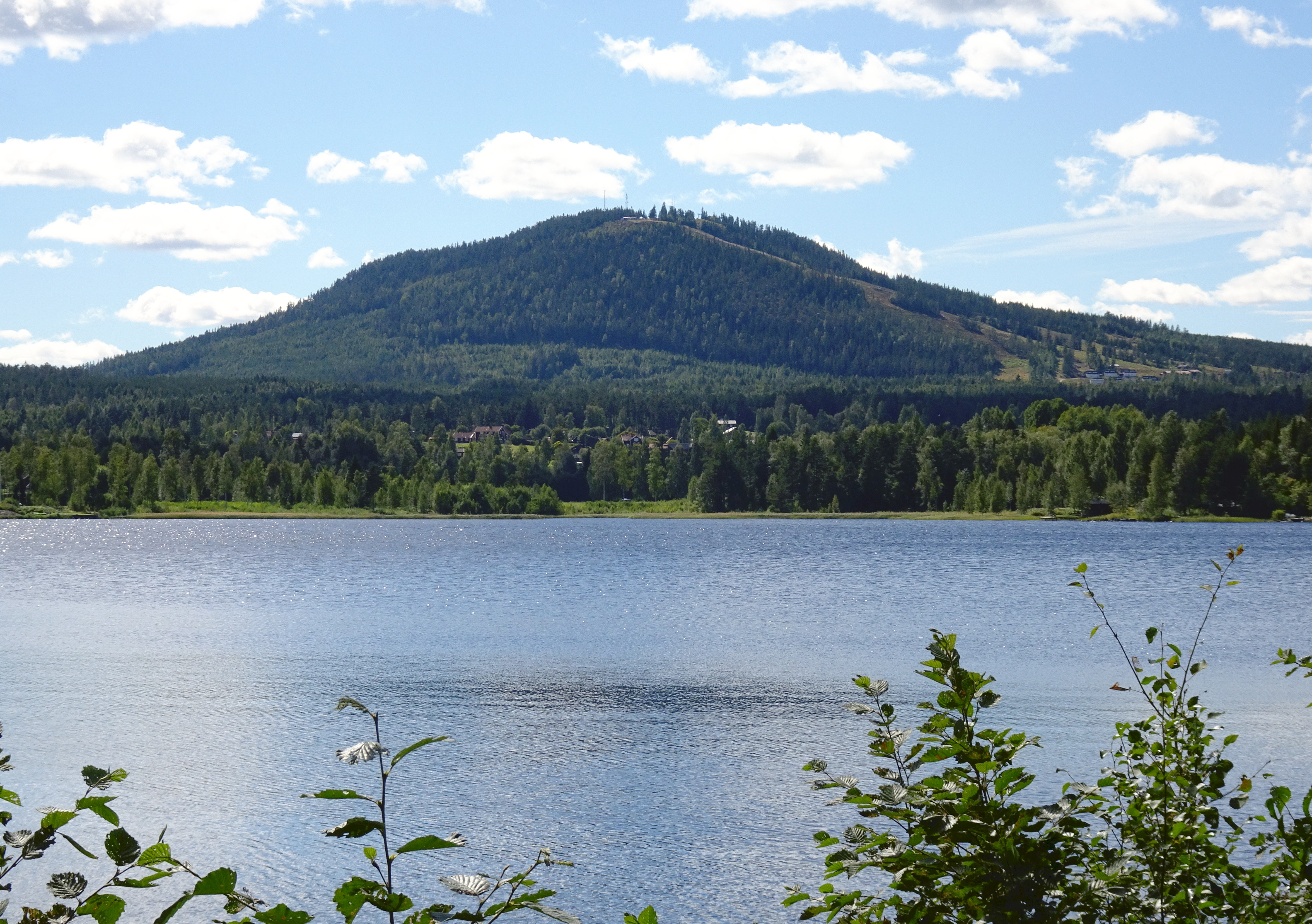 Gesundaberget i i Solleröns socken